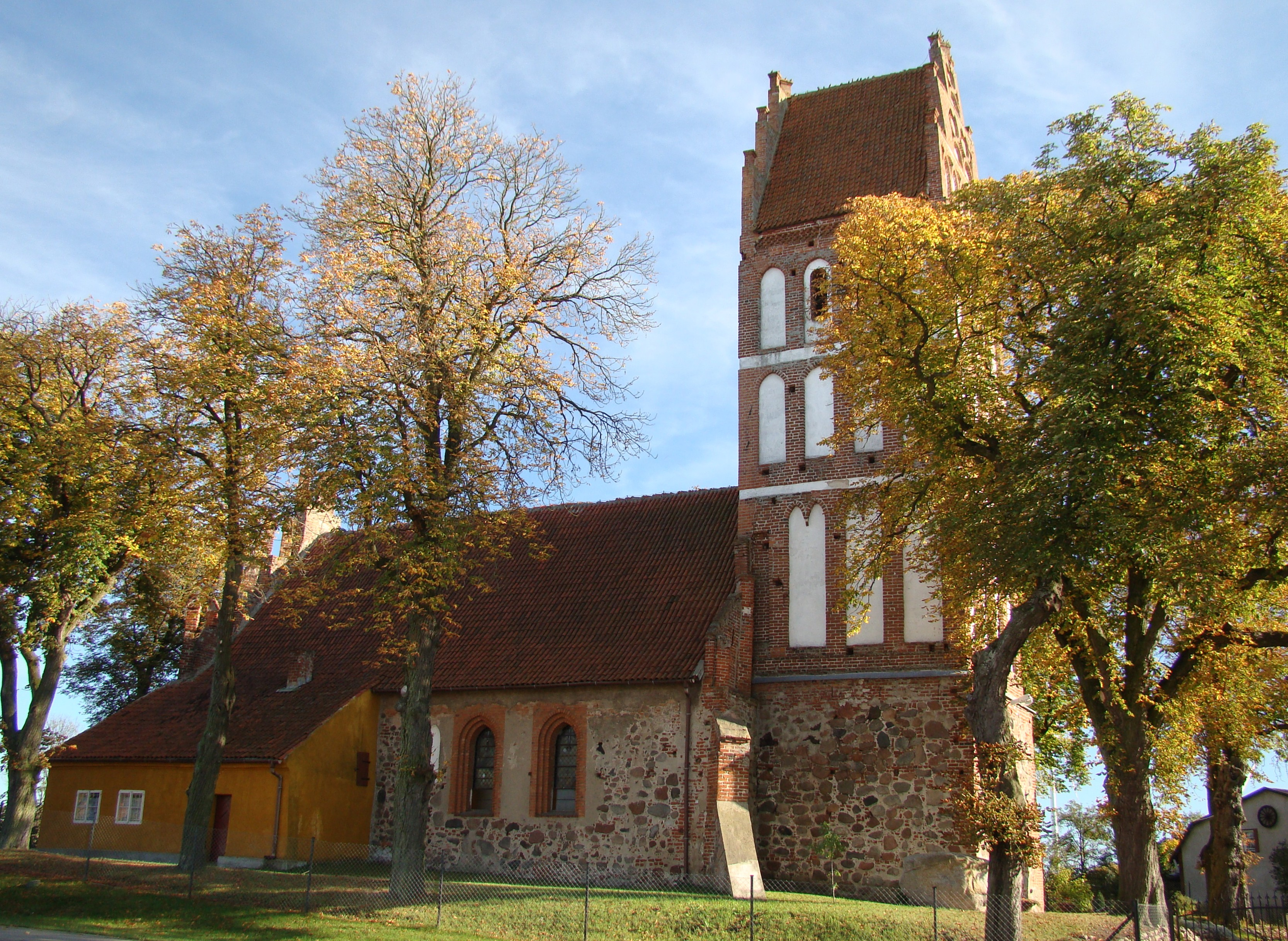 kościół parafialny p.w. św.Jana Chrzciciela nr NID woj. warmińsko-mazurskie 40(Ł/2) z 27.08.1949